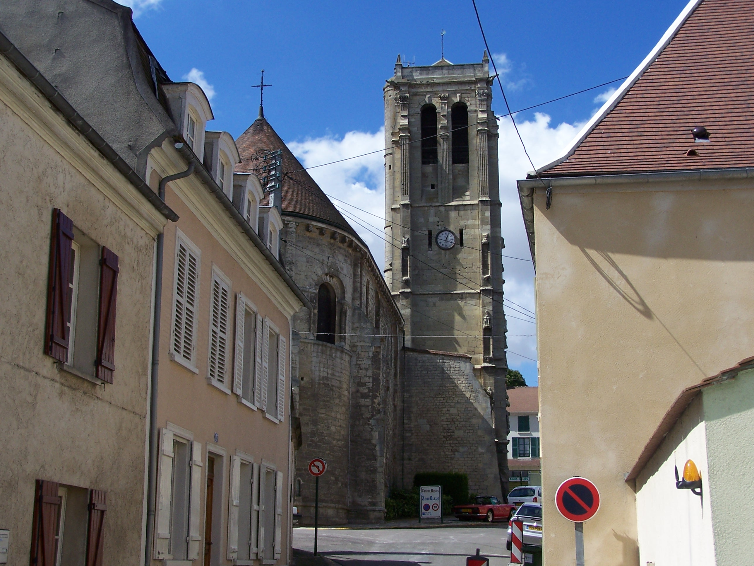 Église de Maule (Yvelines, France). Photo personnelle. Church of Maule (Yvelines, France). Personal photo. Auteur/Author : ℍenry Salomé